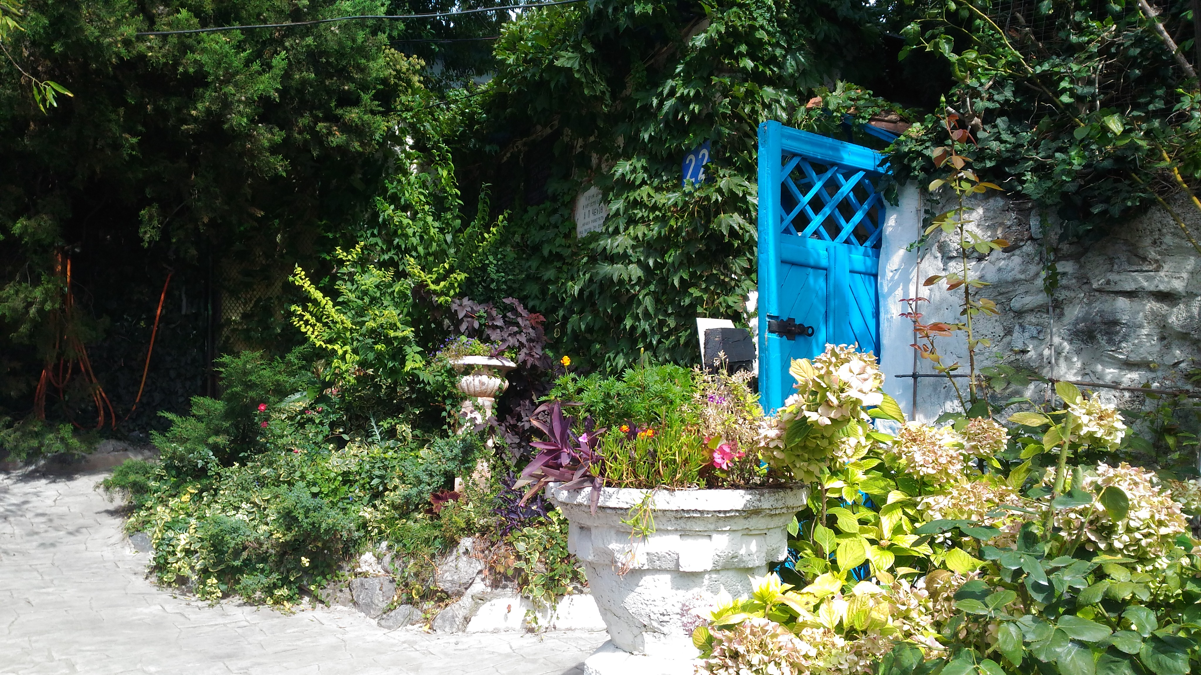 Павильон при въезде в имение Соловьевых: МДЦ «Артек», Гурзуф, Ялта, Крым This object is located on the Crimean Peninsula and recognized as cultural heritage by Russia under the monument ID: 8232029000. The legal status of the Crimean region is currently disputed.